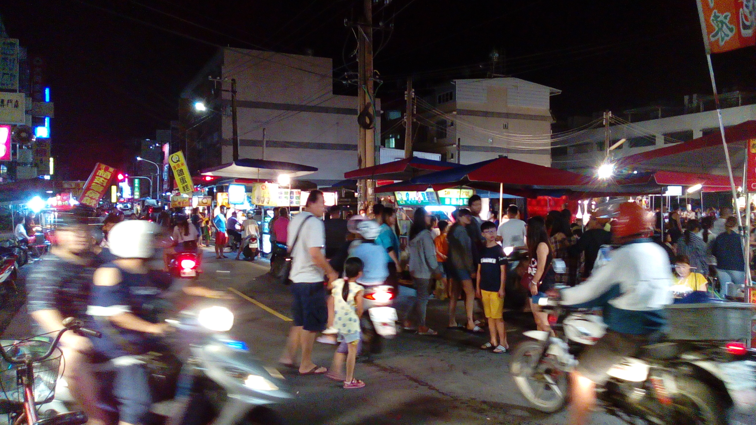 潮州鎮中洲路段